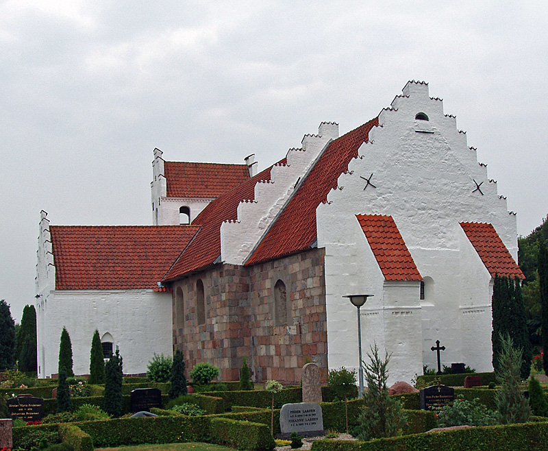 KIrken set fra øst da: Gylling Kirke, Hads Herred, Århus Amt , Danmark